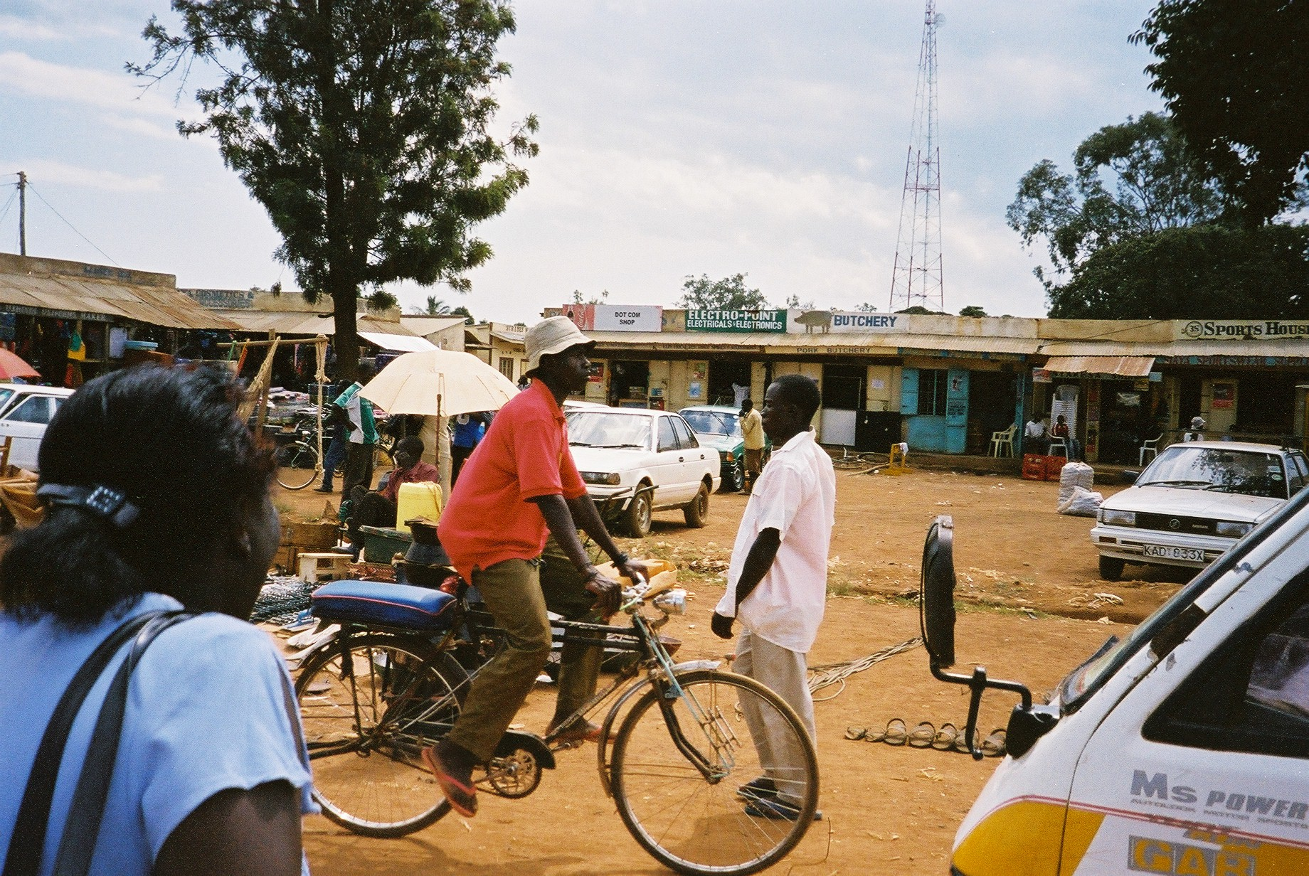 Centre de Siaya avec un bodaboda au centre